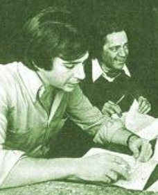 Sergio Renán en 1970